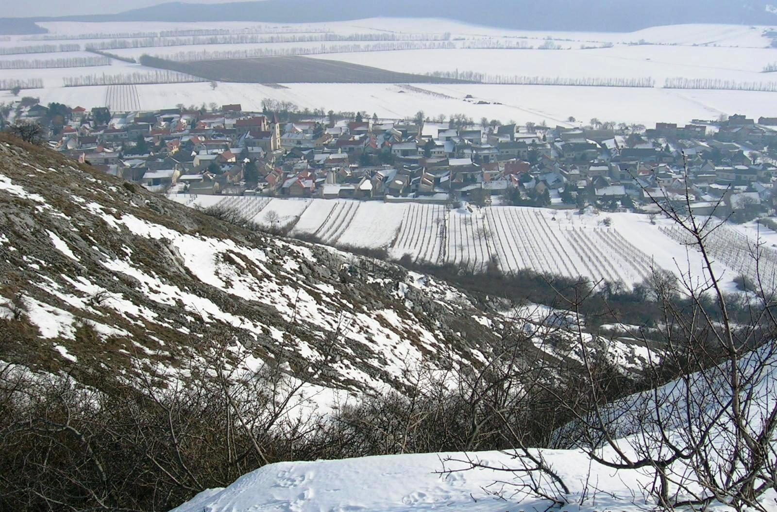 Hundsheim (NÖ) vom Hexenberg